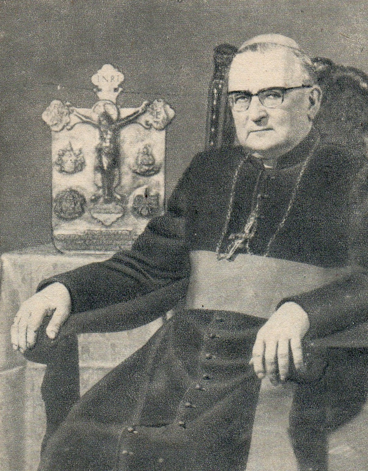 Biskup Ignacy Jeż.